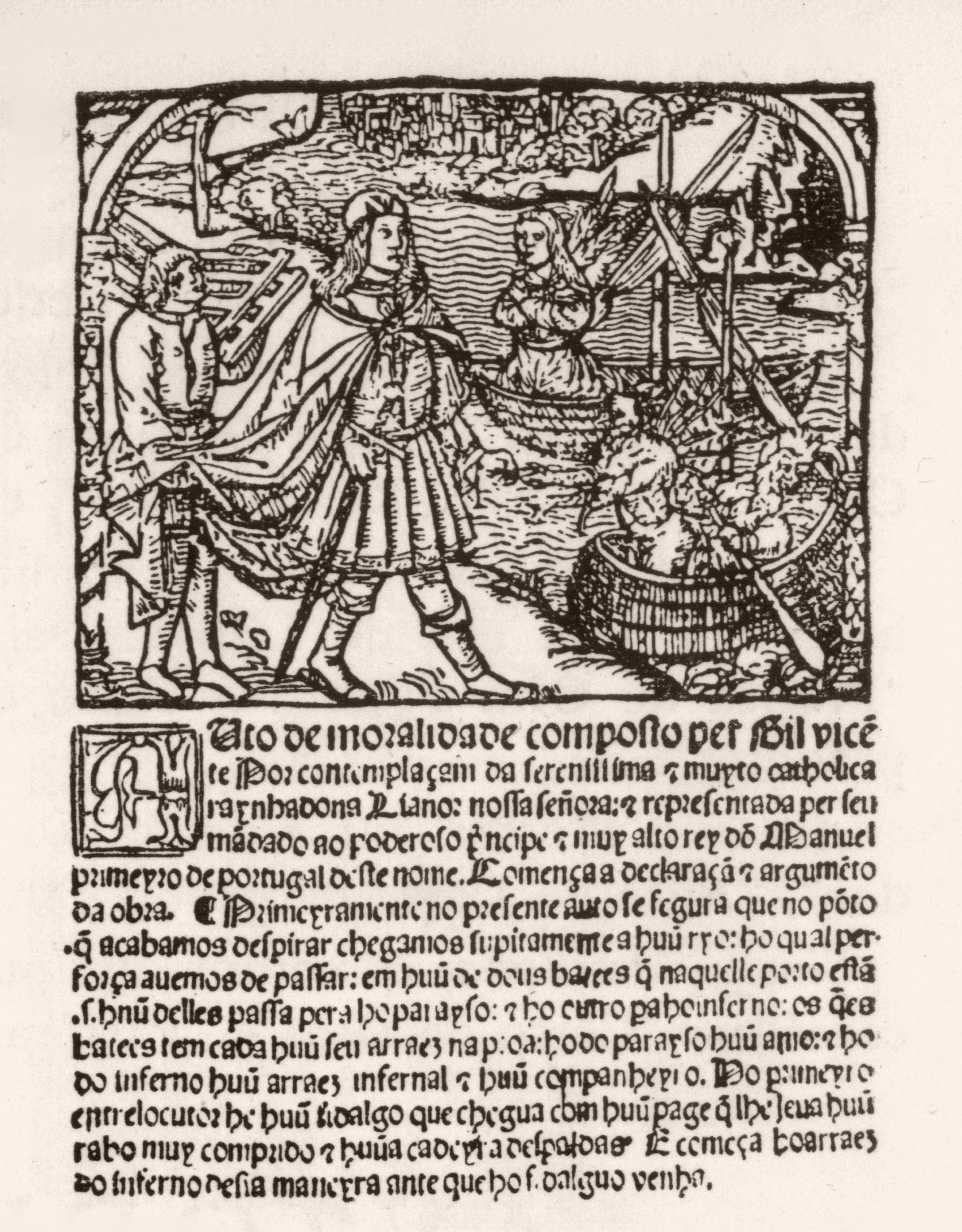 Frontispício do Auto da Moralidade, ou seja a "Barca do Inferno" de Gil Vicente.